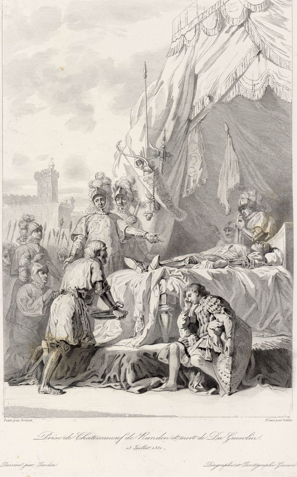 Prise de Châteauneuf de Randon et mort de Du Guesclin